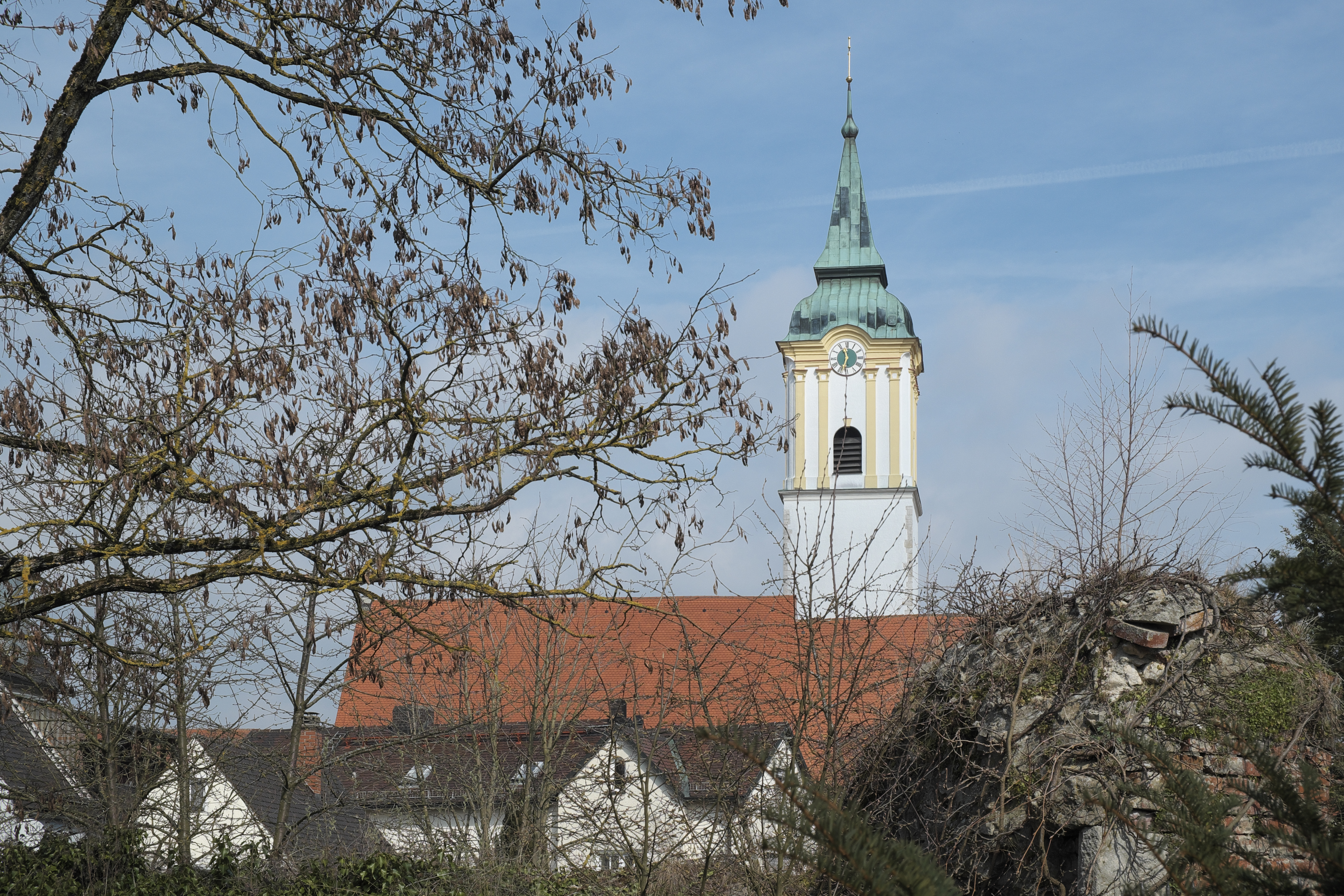 Katholische Pfarrkirche St. Barbara in Abensberg im Landkreis Kelheim in Niederbayern (Bayern), Kirchturm